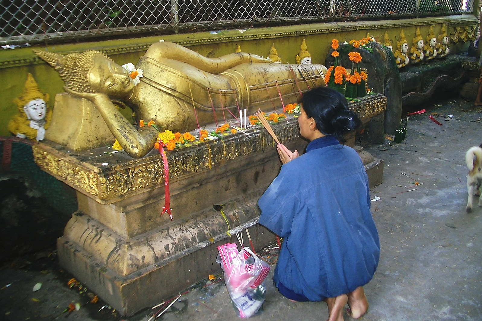 Photo by Ohsa Khayphet Wat Simuong ワット・シムアン ビエンチャン 1563年、セタティラート王がルアンパバーンからビエンチャンに遷都した後に、建立された寺院。建設時、柱を立てるための穴に妊娠した女性が神への生け贄としてささげられ、その上に石柱を立てたために、ここが聖なる土地となったという伝説が残る。そのため、女性の参拝者が非常に多い。